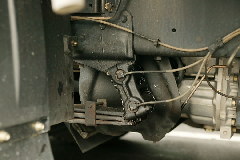 Leaf spring.